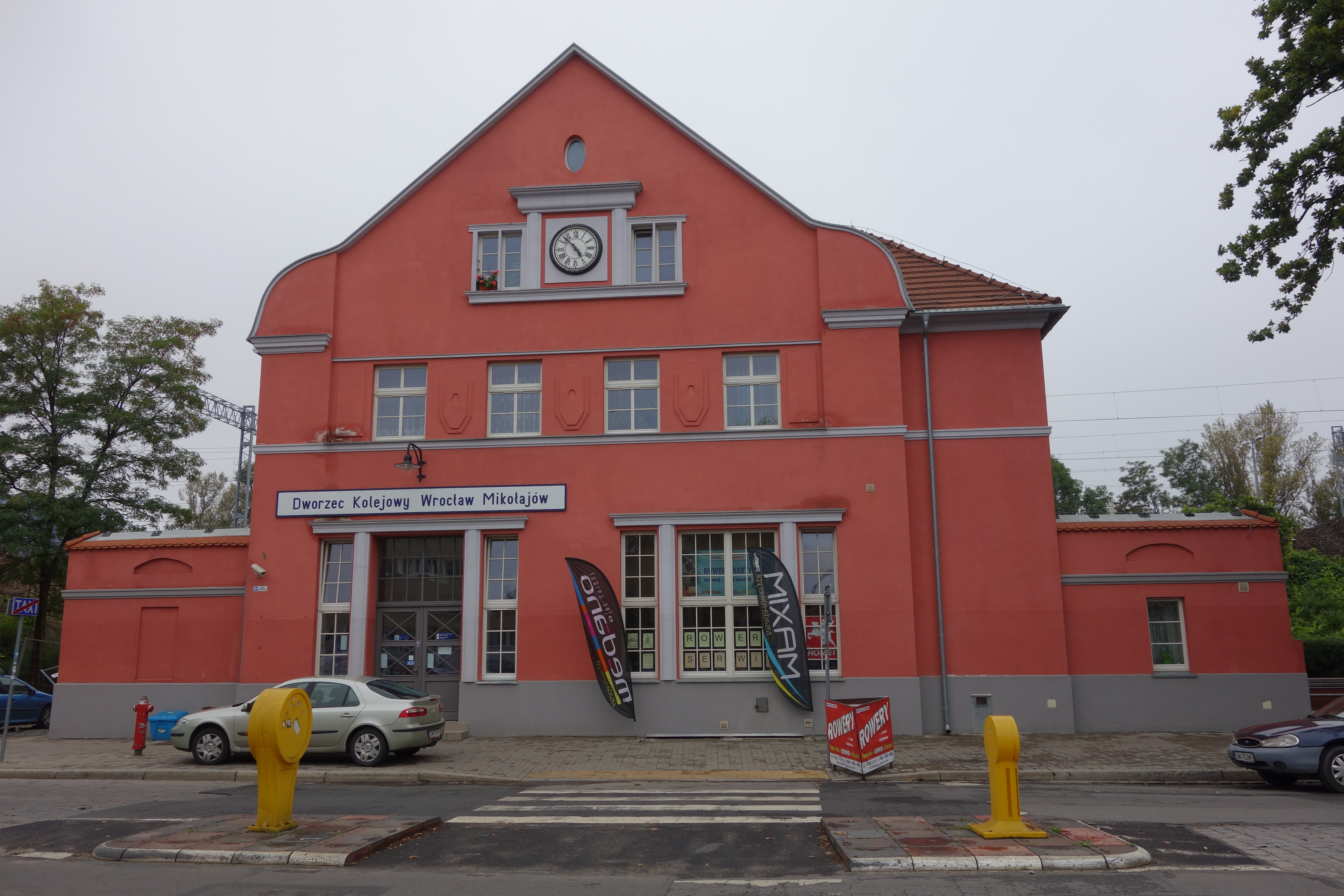 Wrocław Mikołajów - dworzec kolejowy This photo was taken during Railway Wikiexpedition 2014 set up by Wikimedia Polska Association. You can see all photographs in category Wikiekspedycja kolejowa 2014. English | Polski | +/−